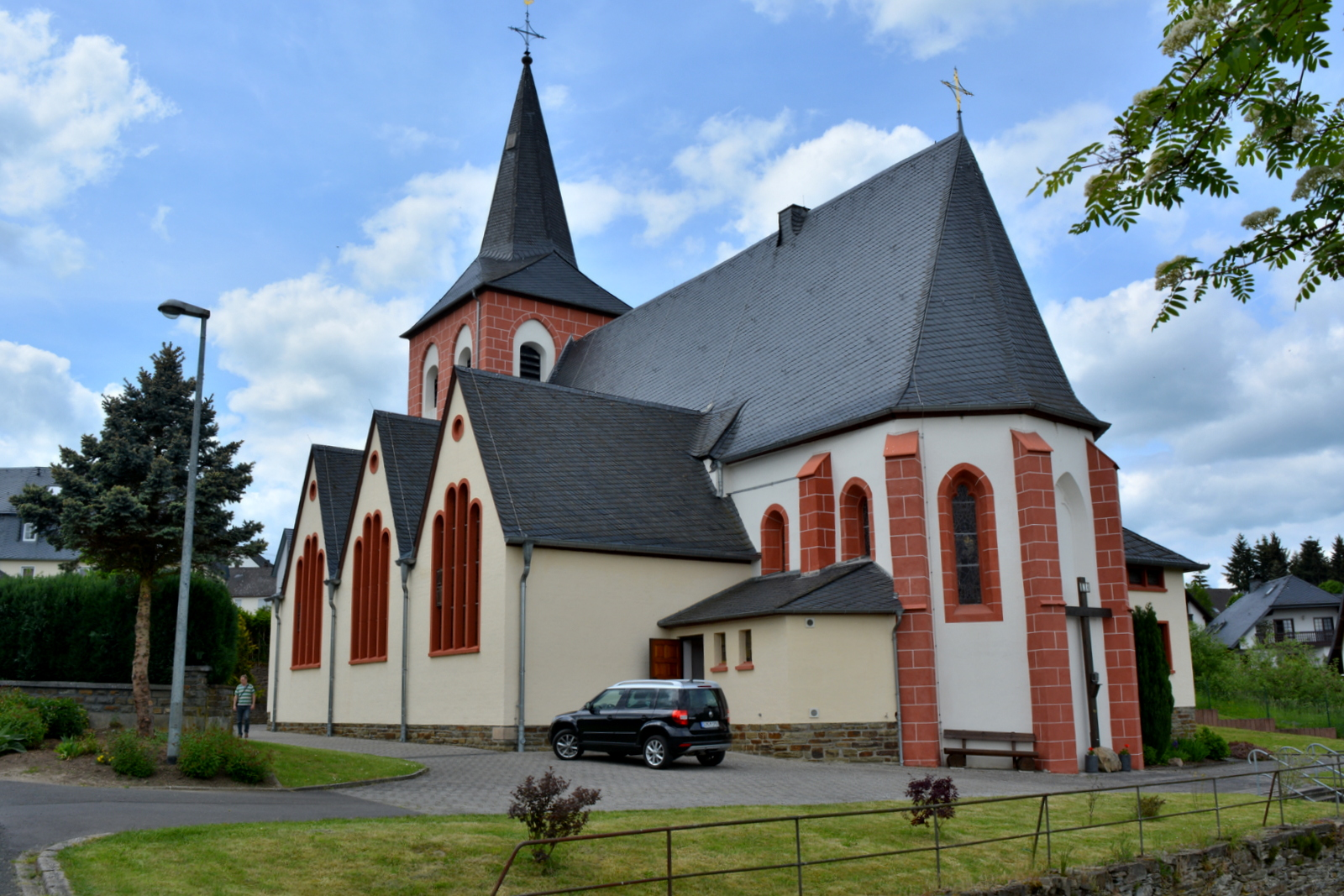 Katholieke Kerk Sint-Stefanus te Niederburg